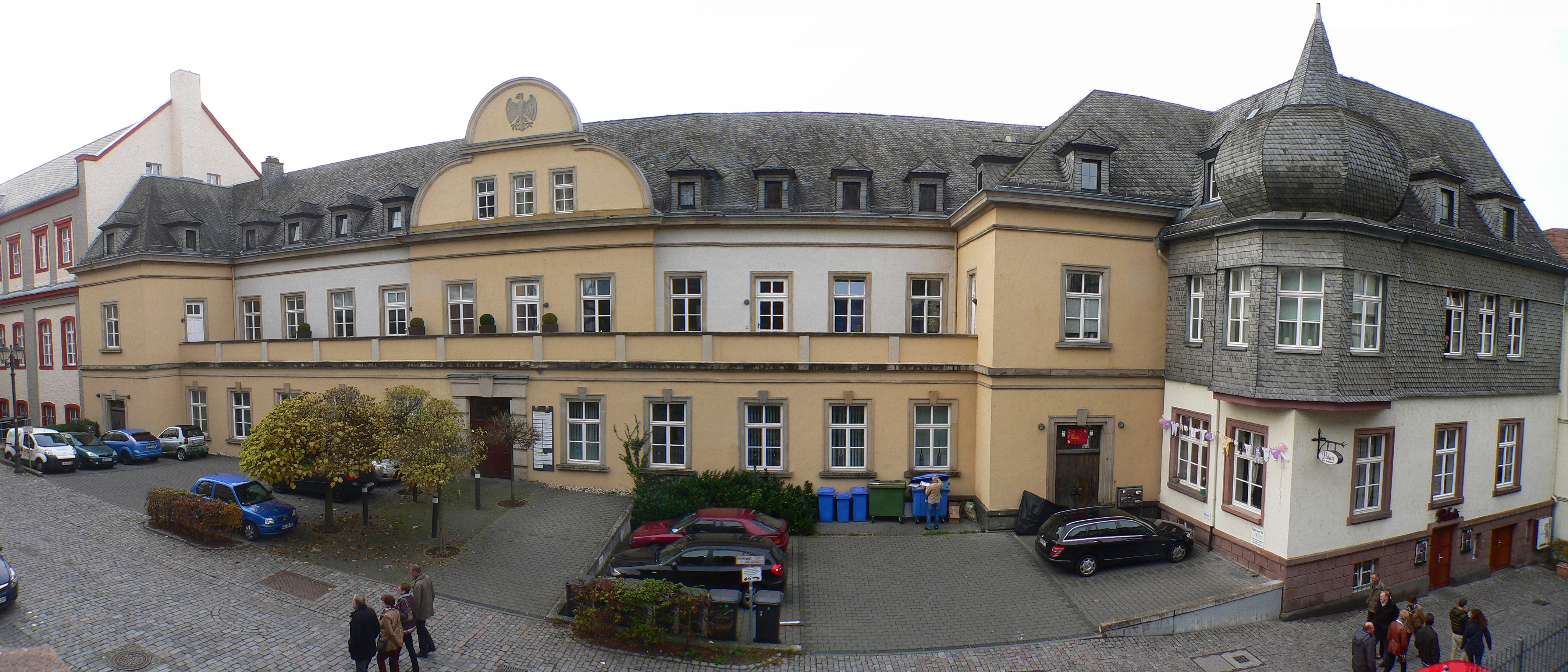 Ingelheim'sches Palais in Wetzlar, Deutschlnad, Hessen. Frontansicht (Straßenseite).